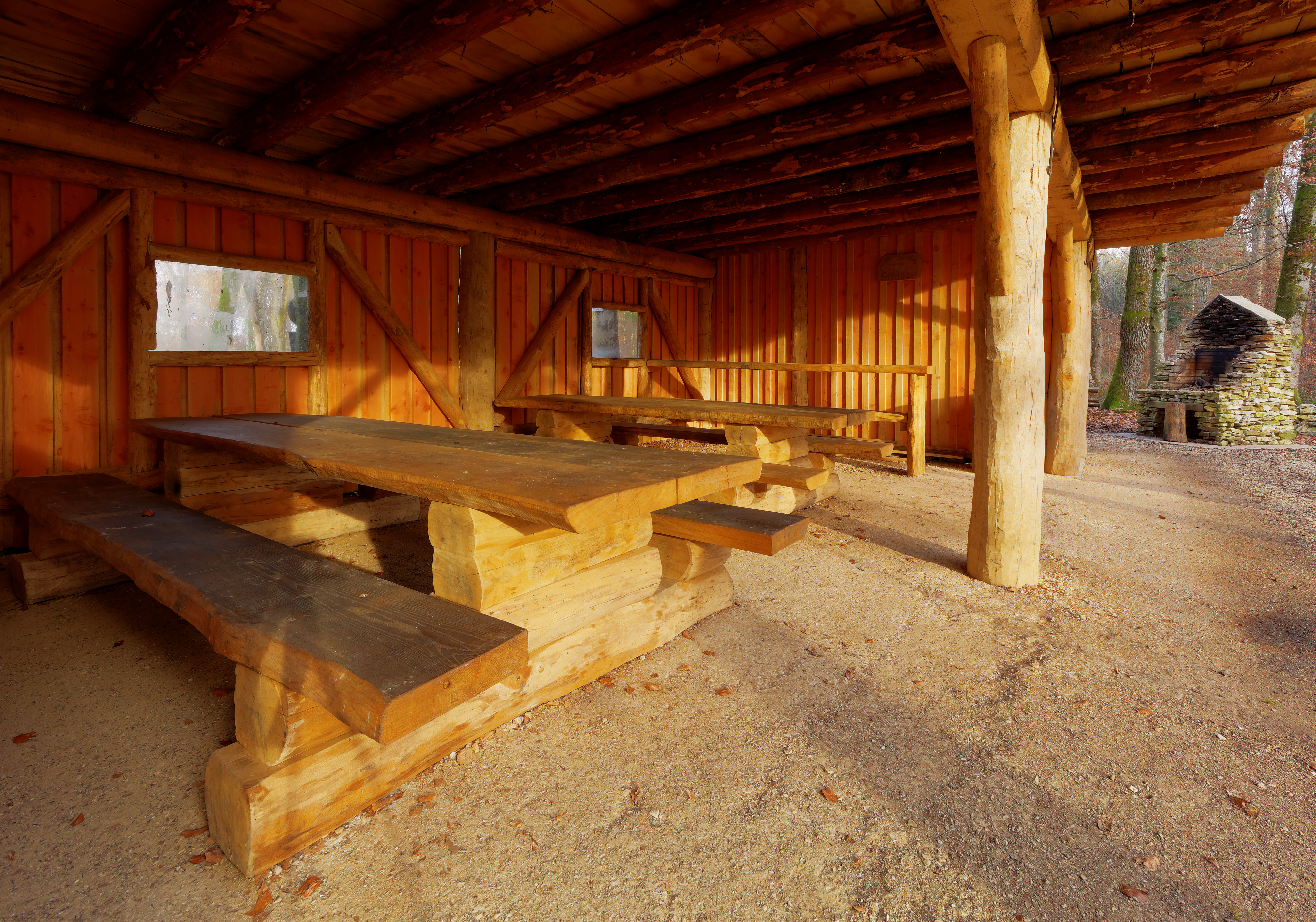 Site de la borne des Trois Puissances (HDR). Côté suisse, un abri a été construit par l'armée suisse. Intérieur de l'abri.